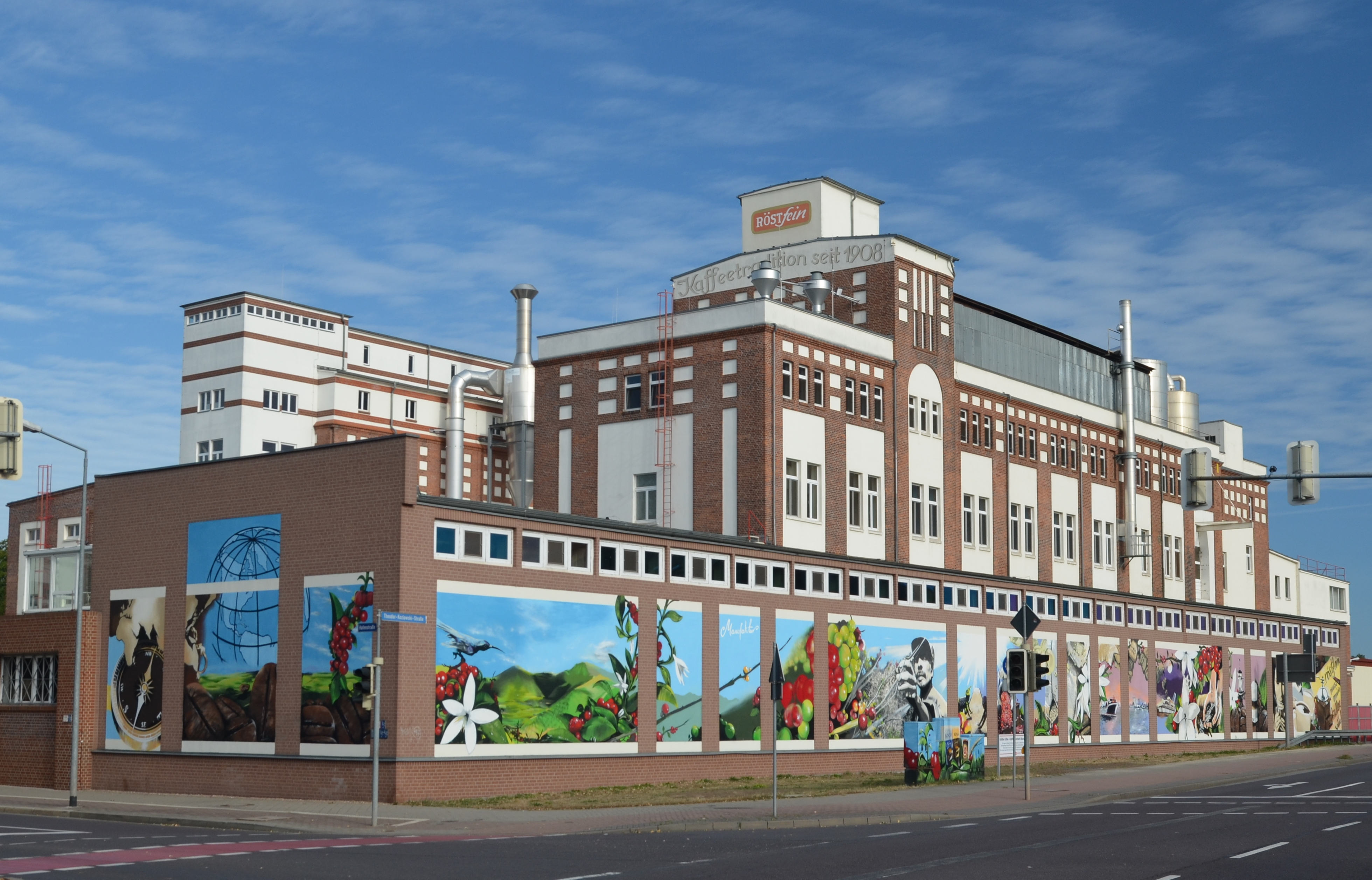 Röstfein-Kaffee-Werk in Magdeburg, größtes Kaffee-Graffiti-Kunstwerk Deutschlands